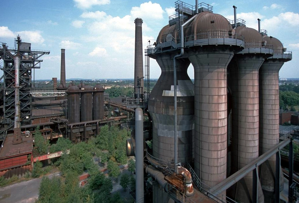 Landschaftspark Duisburg-Nord in Duisburg-Meiderich